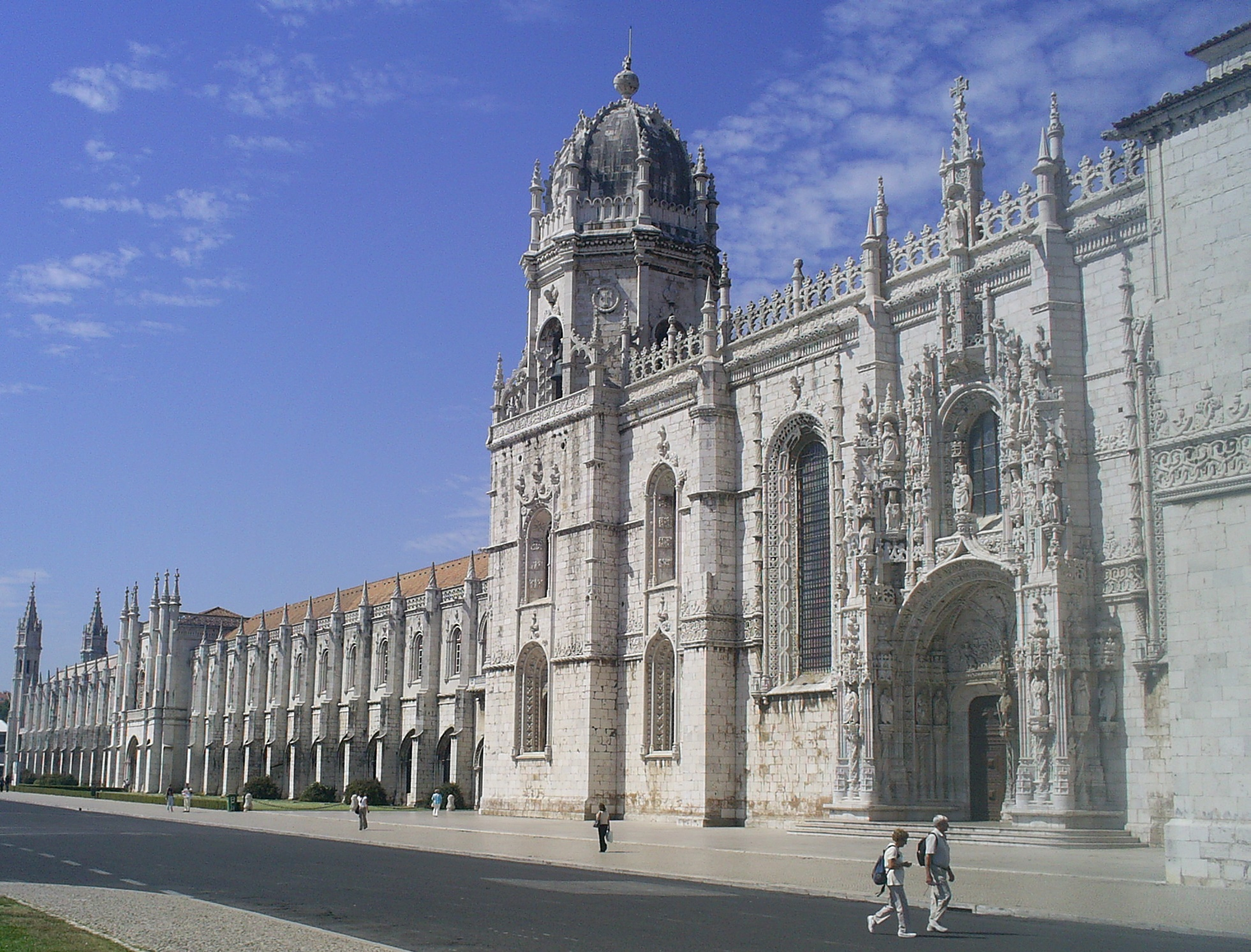 Façade of the Jerónimos Monastery.